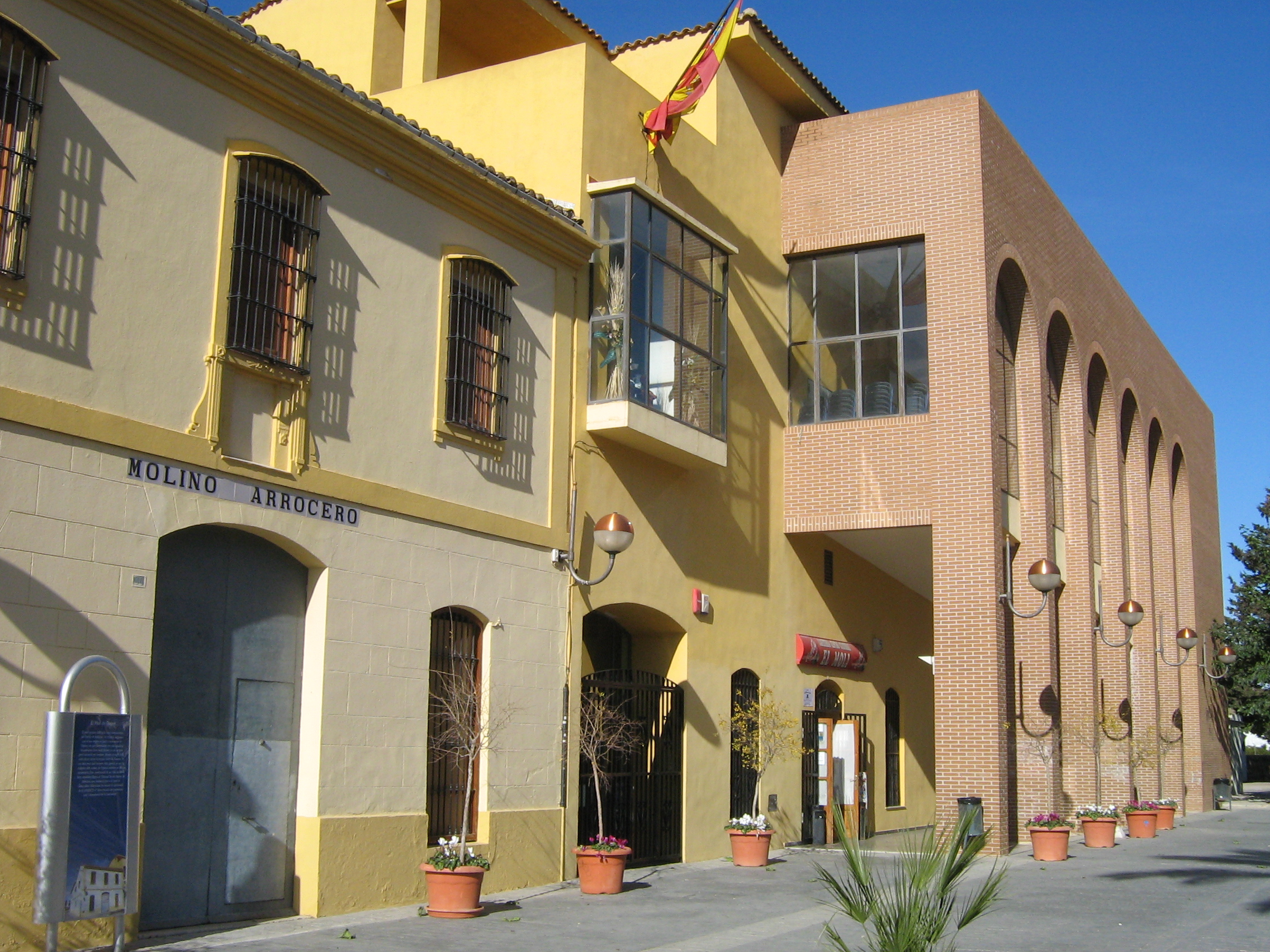 Centro cultural el Molí Benetússer